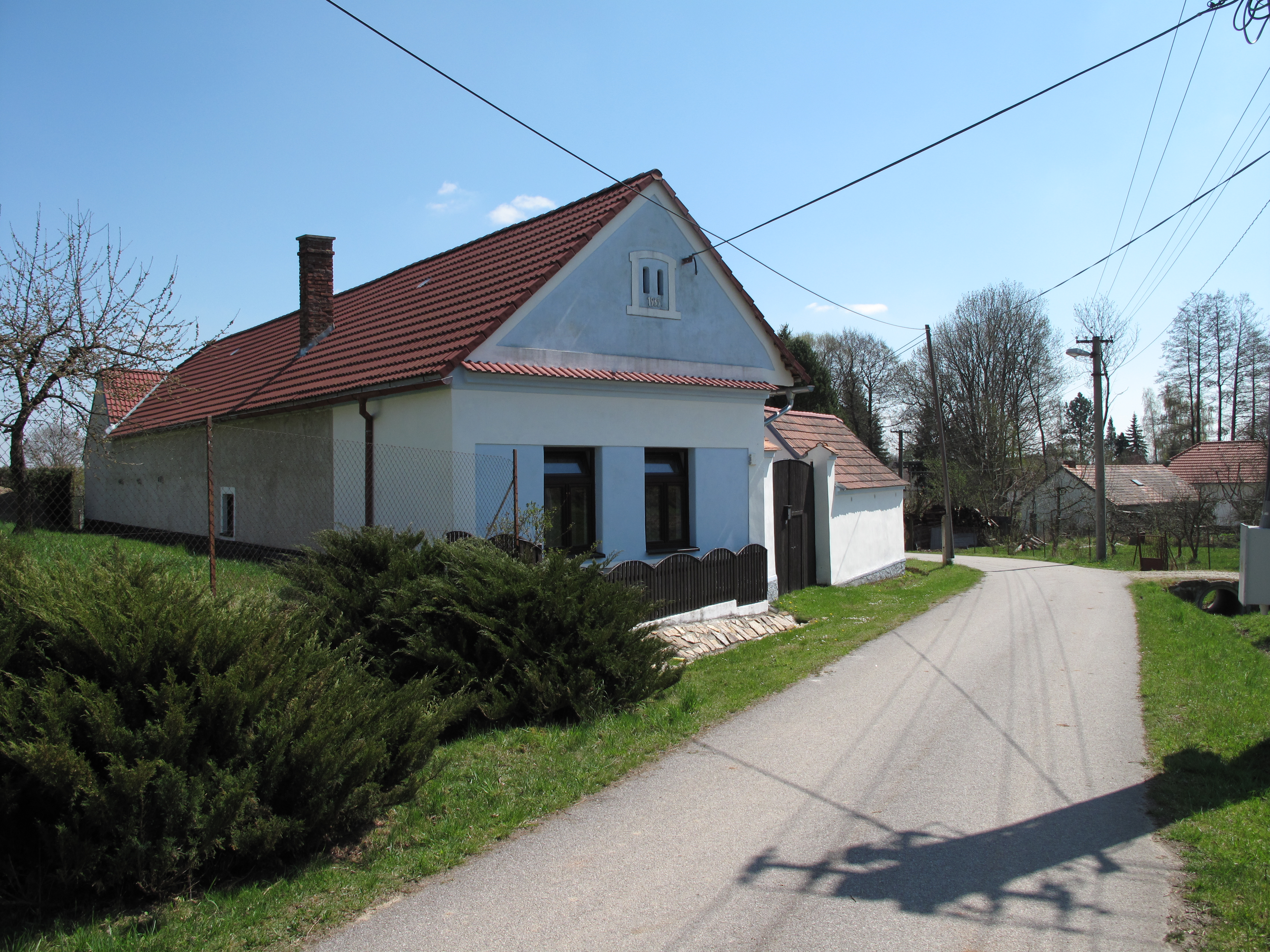 Dům v Popovicích. Okres České Budějovice, Česká republika.